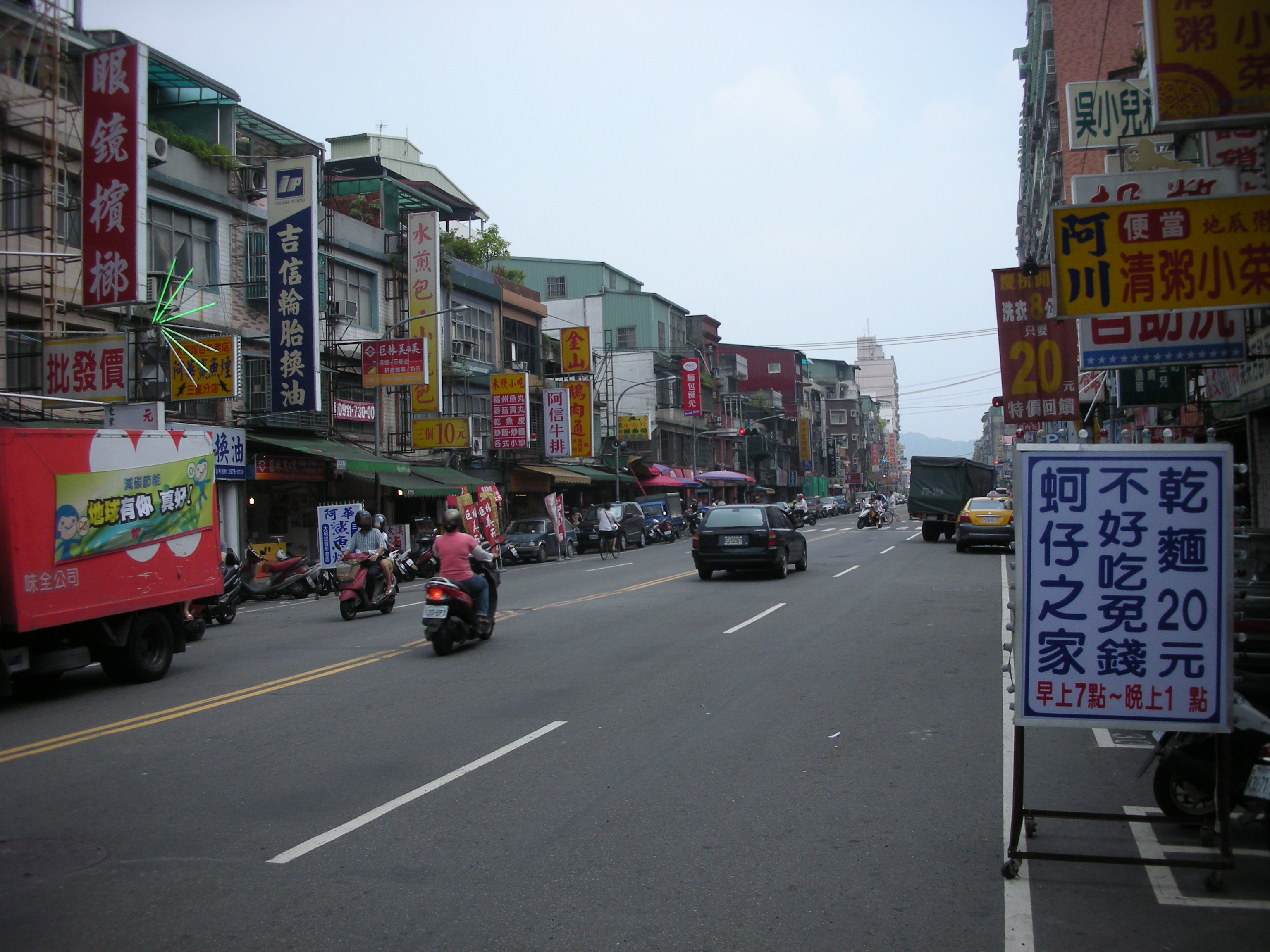 三重市龍門路街景